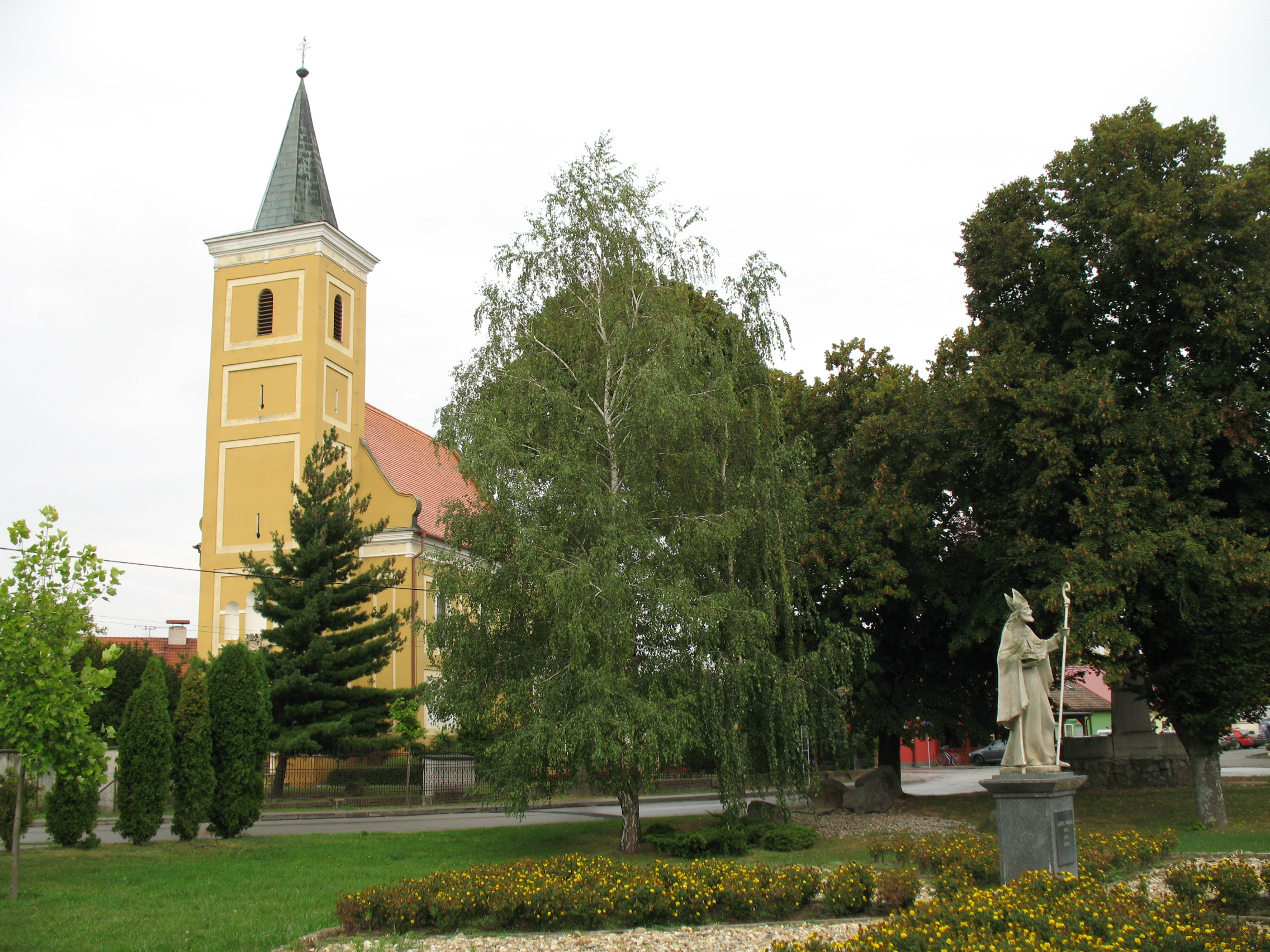 templom